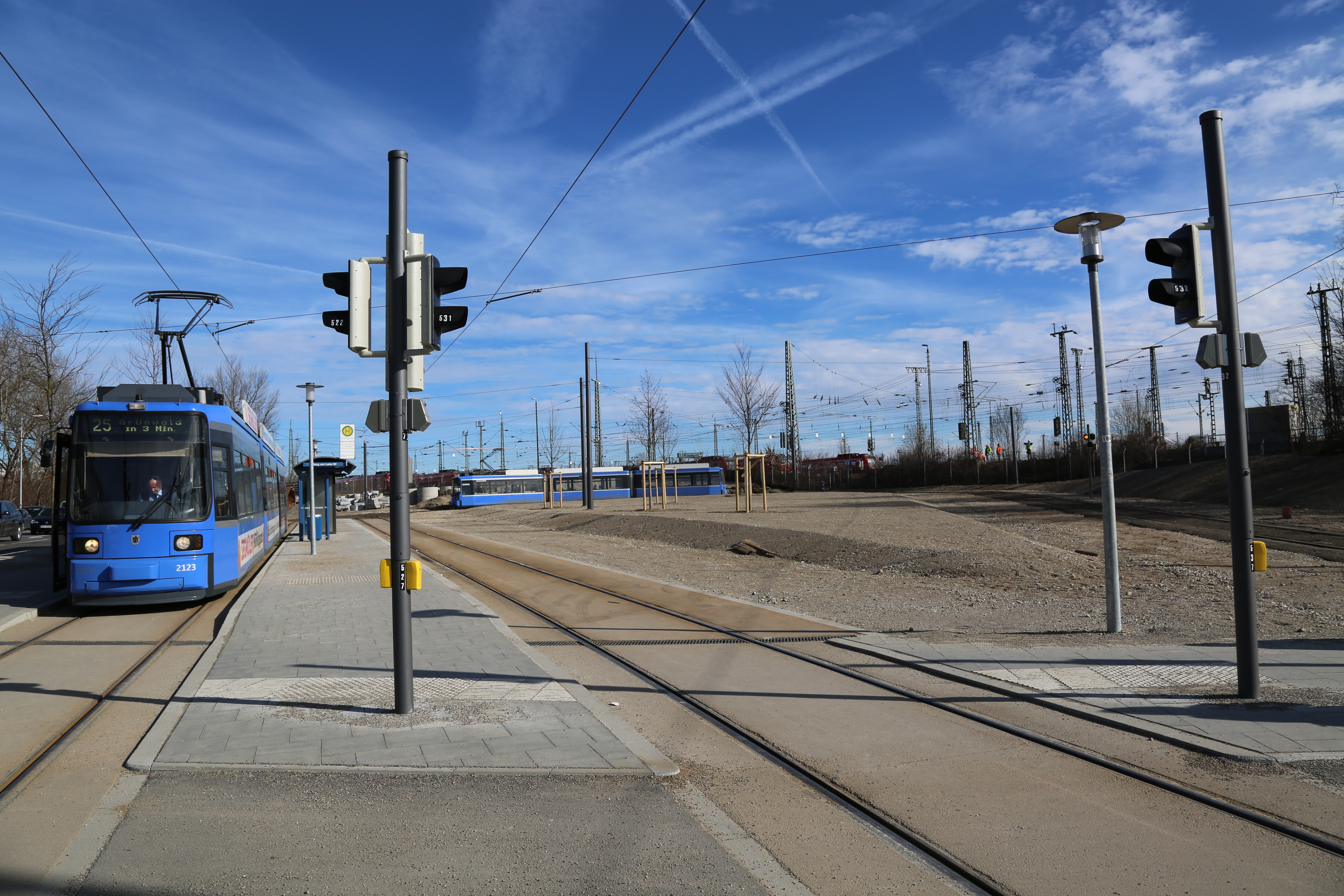 Endhaltestelle Berg am Laim: Während eine Tram kurz vor der Abfahrt ist, steht die Nachfolgende Tram kurz vor der Ankunft